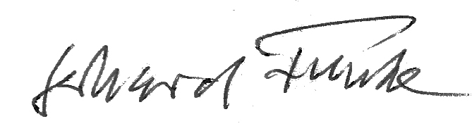 Gerhard Funke, Philosoph. Seine Signatur auf einem von ihm im Juli 1994 handgeschriebenen Brief an mich.